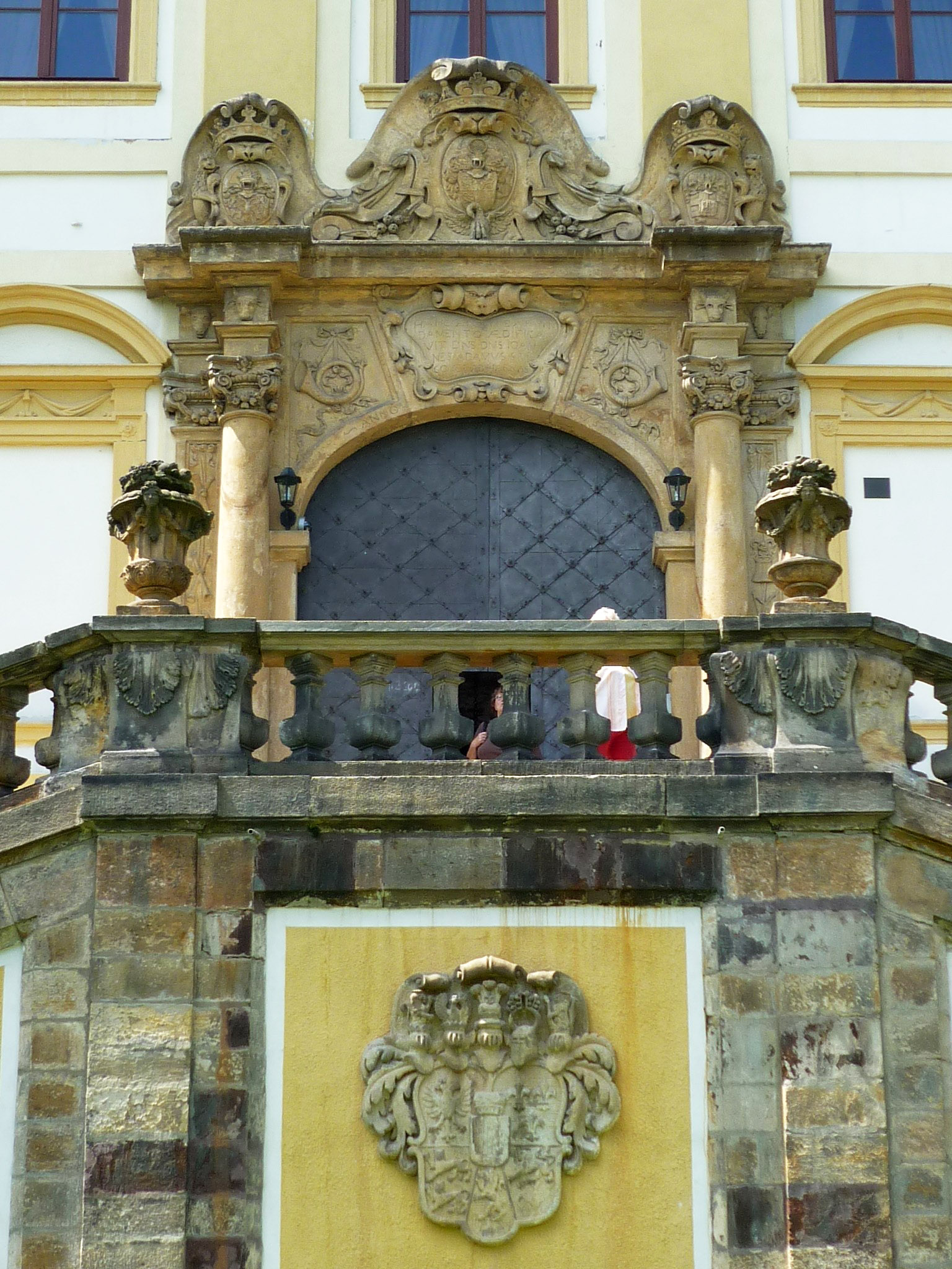 Schloss Rothenhaus bei Görkau in Nordböhmen (Červený Hrádek), Schlossportal mit Wappen der Fürsten Hohenlohe-Langenburg